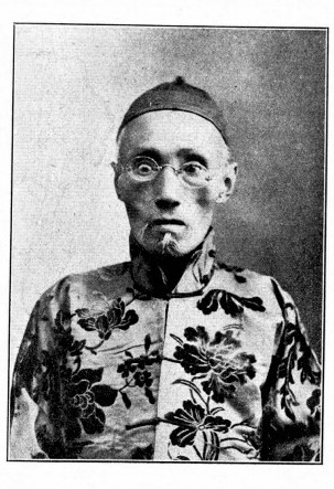 中文（台灣）: 王玉琦議員